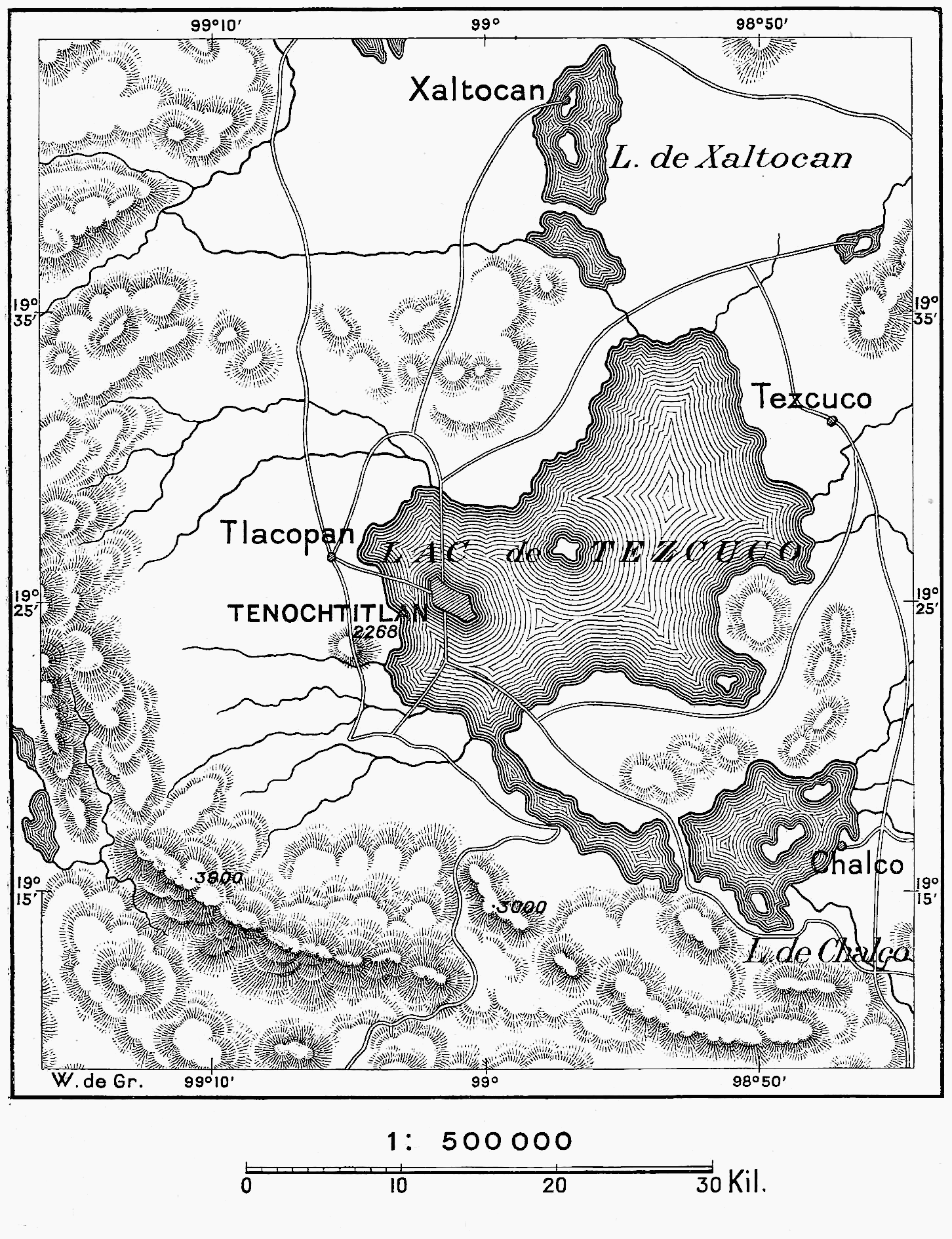 N° 338. Tenochtitlan et sa Lagune.